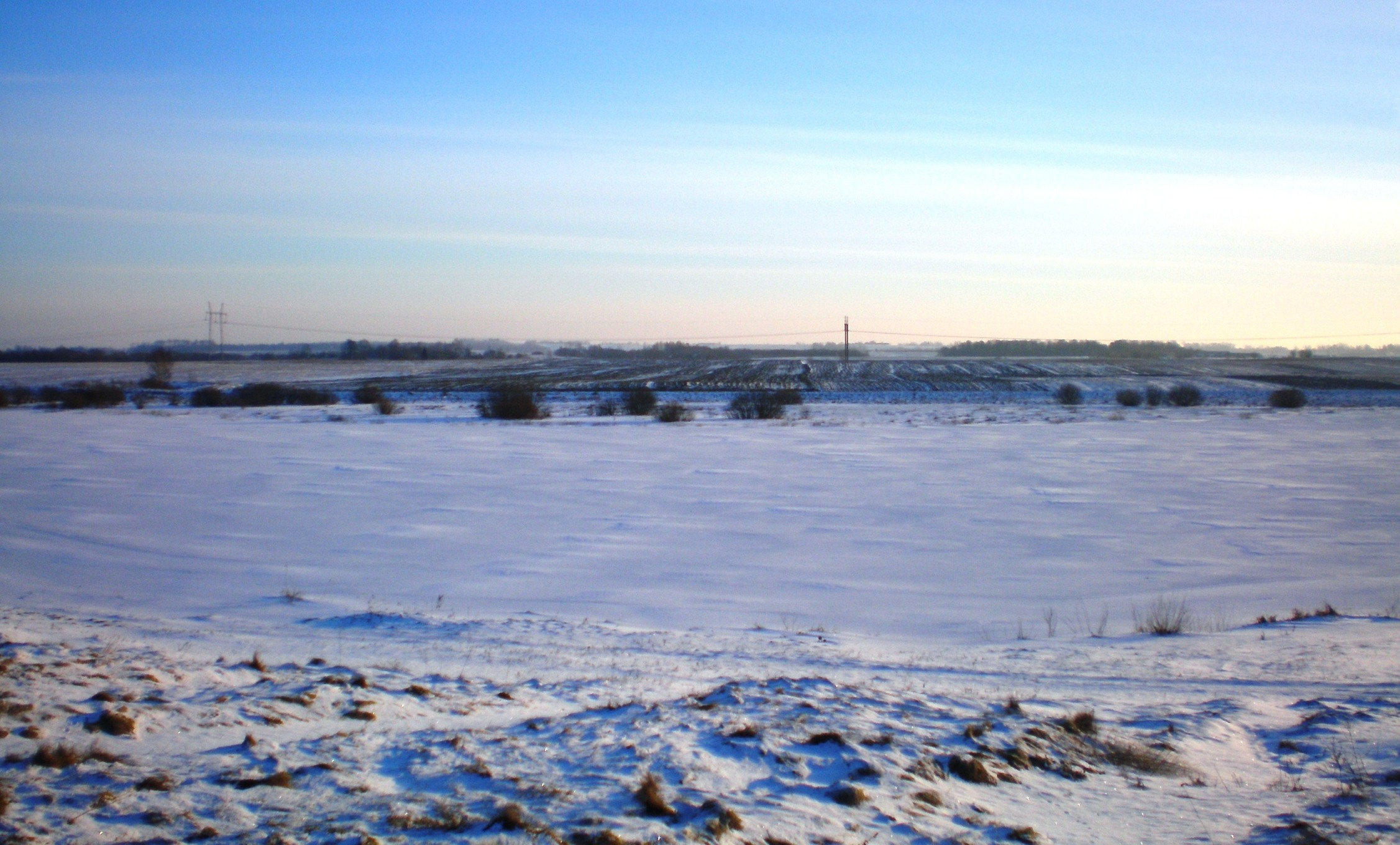 Statkūniškės ežeras, Žasliai